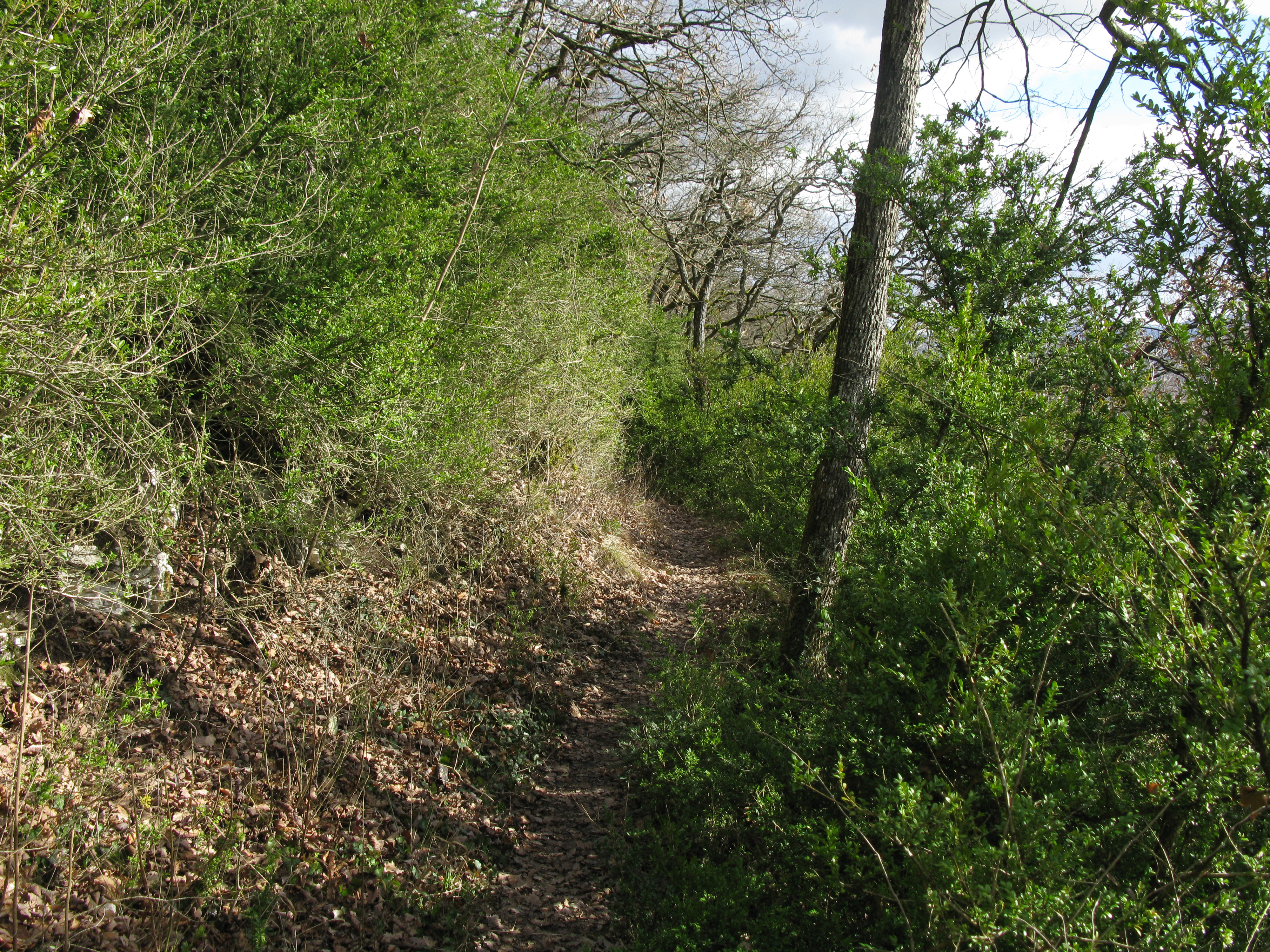 Buchswald am Westweg in Grenzach-Wyhlen